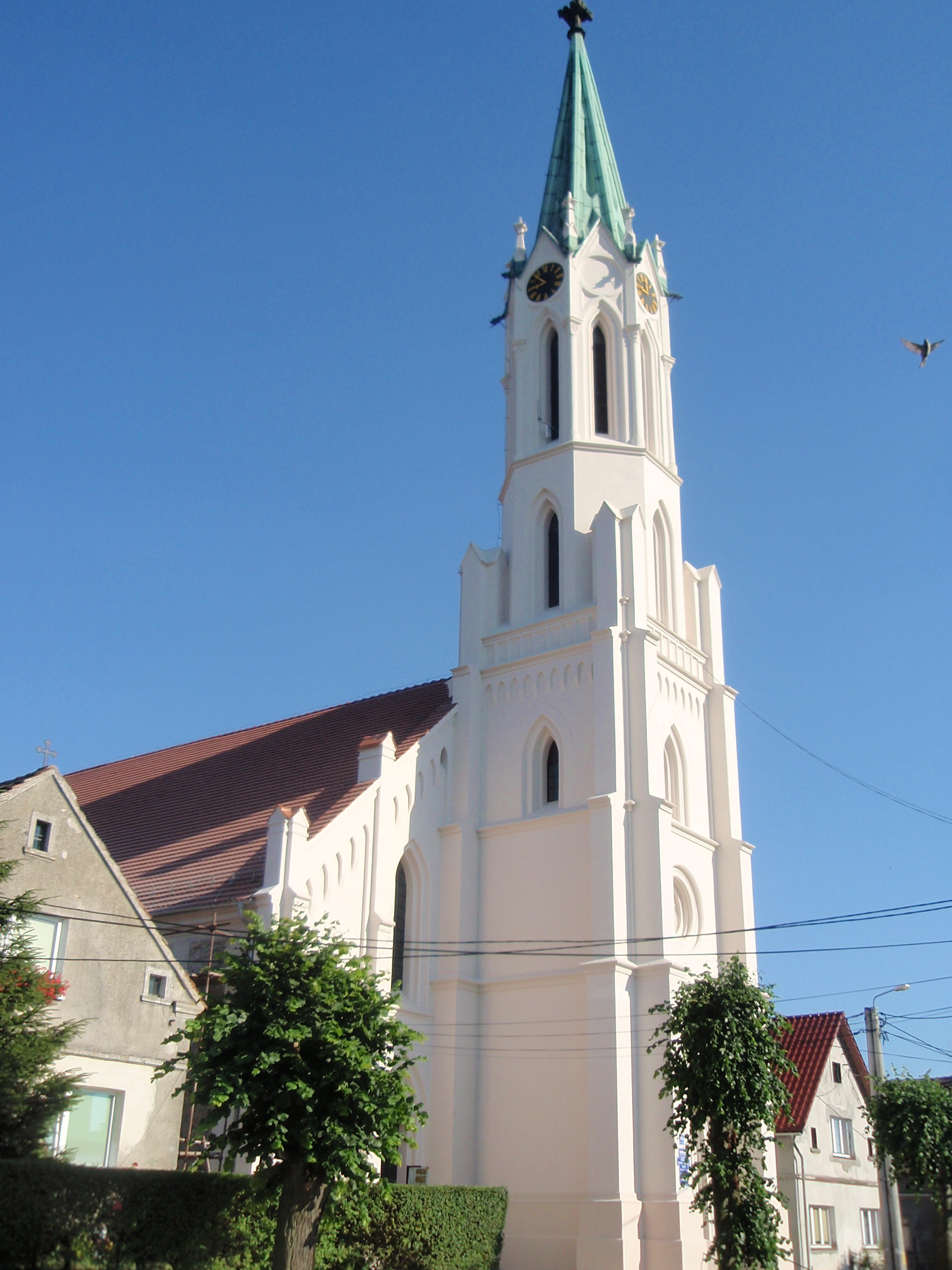 Gaworzyce (powiat polkowicki) - dawny kościół ewangelicki, obecnie rzymskokatolicki pw. Matki Boskiej Różańcowej (zabytek nr rejestr. A/1548/380)